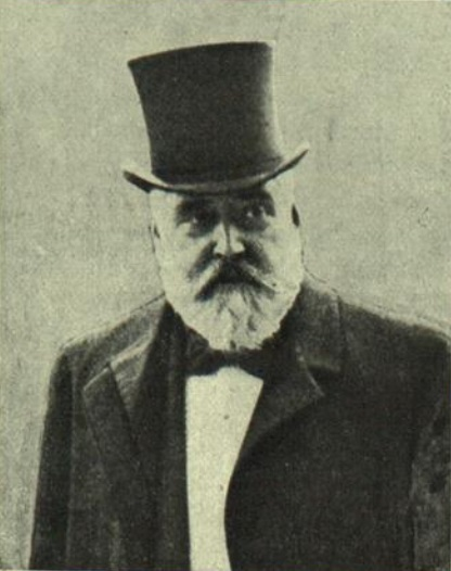 Joaquín González de la Peña, ministro de Gracia y Justicia.